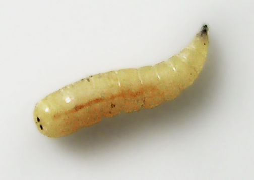 Larve einer Stubenfliege (Musca domestica (larva))